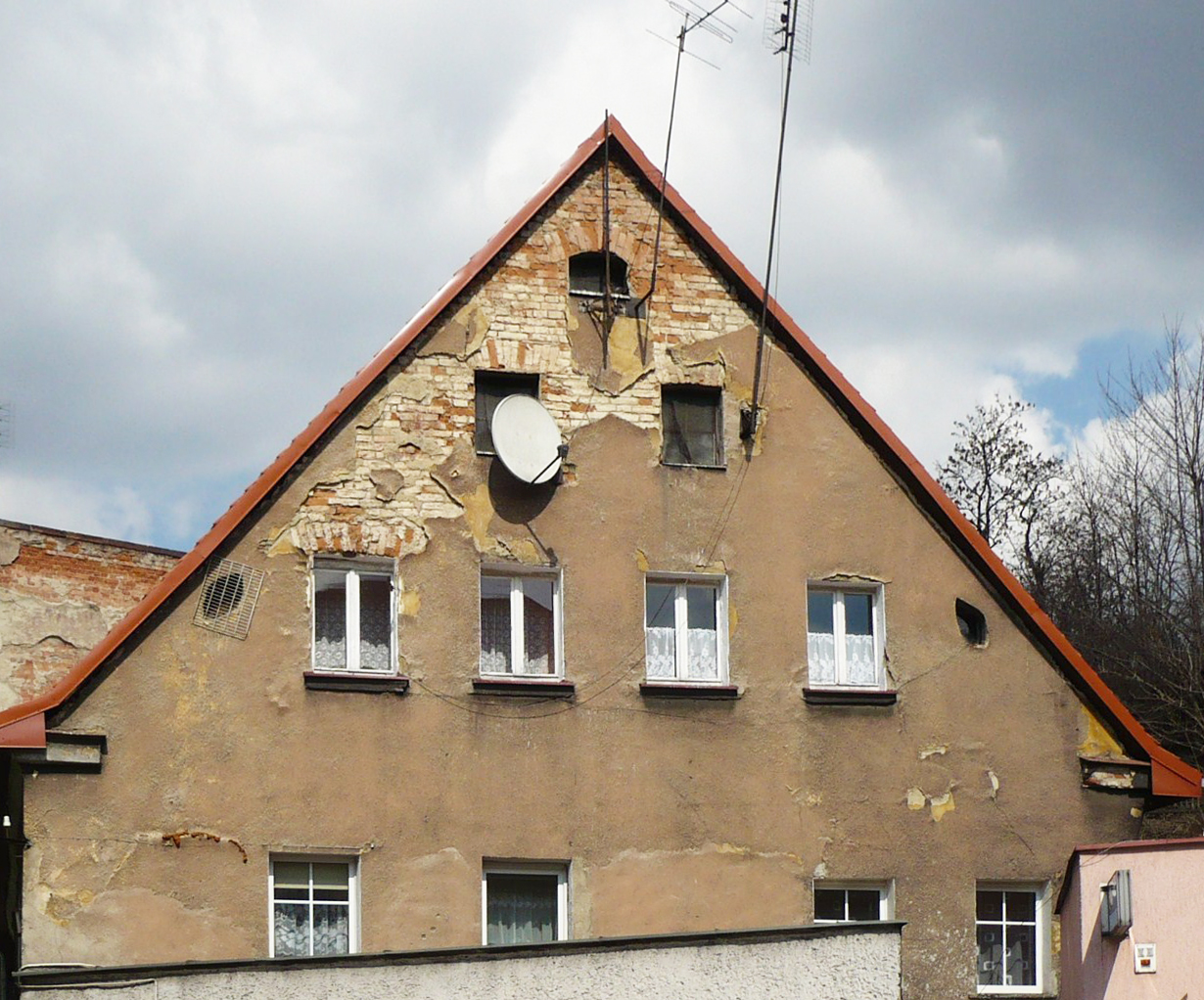 Nowa Ruda, ul. Piastów 1 - dom, widok z boku (zabytek nr A/943/1437/WŁ z 7.06.1995)